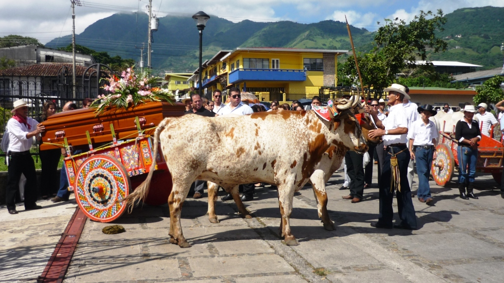 Las carretas como arte están íntimamente vinvuladas al café dentro de la "cultura del café" de Costa Rica y tienen una tradición que data de más de tres siglos.